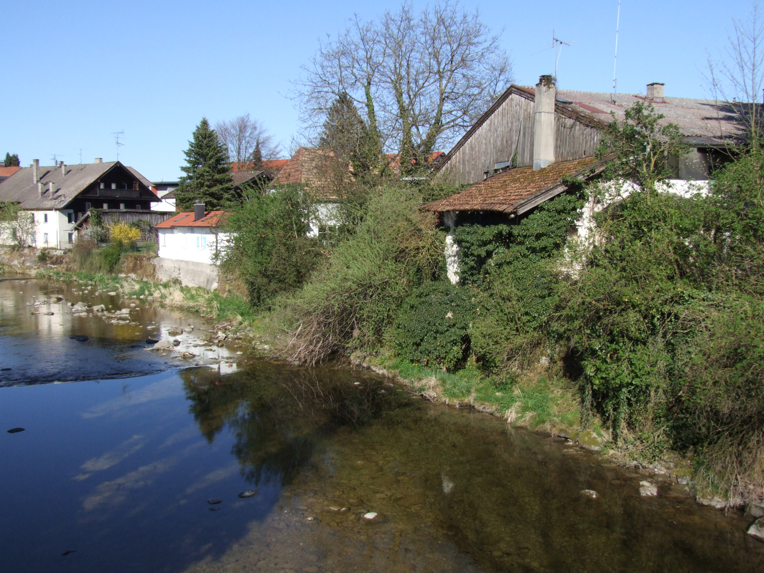 Quelle: selbst fotografiert, 04/2007 Fotograf: Späth Chr.